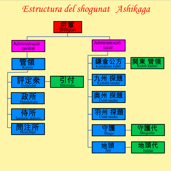 Organigrama